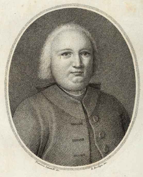 Francesco Sabatelli, Benedetto Bordiga, Ritratto di Pompeo Neri (post 1768 - ante 1829; stampa all’acquaforte, 7,1 x 8,6 cm; Monza, Civica Raccolta di Incisioni Serrone Villa Reale)